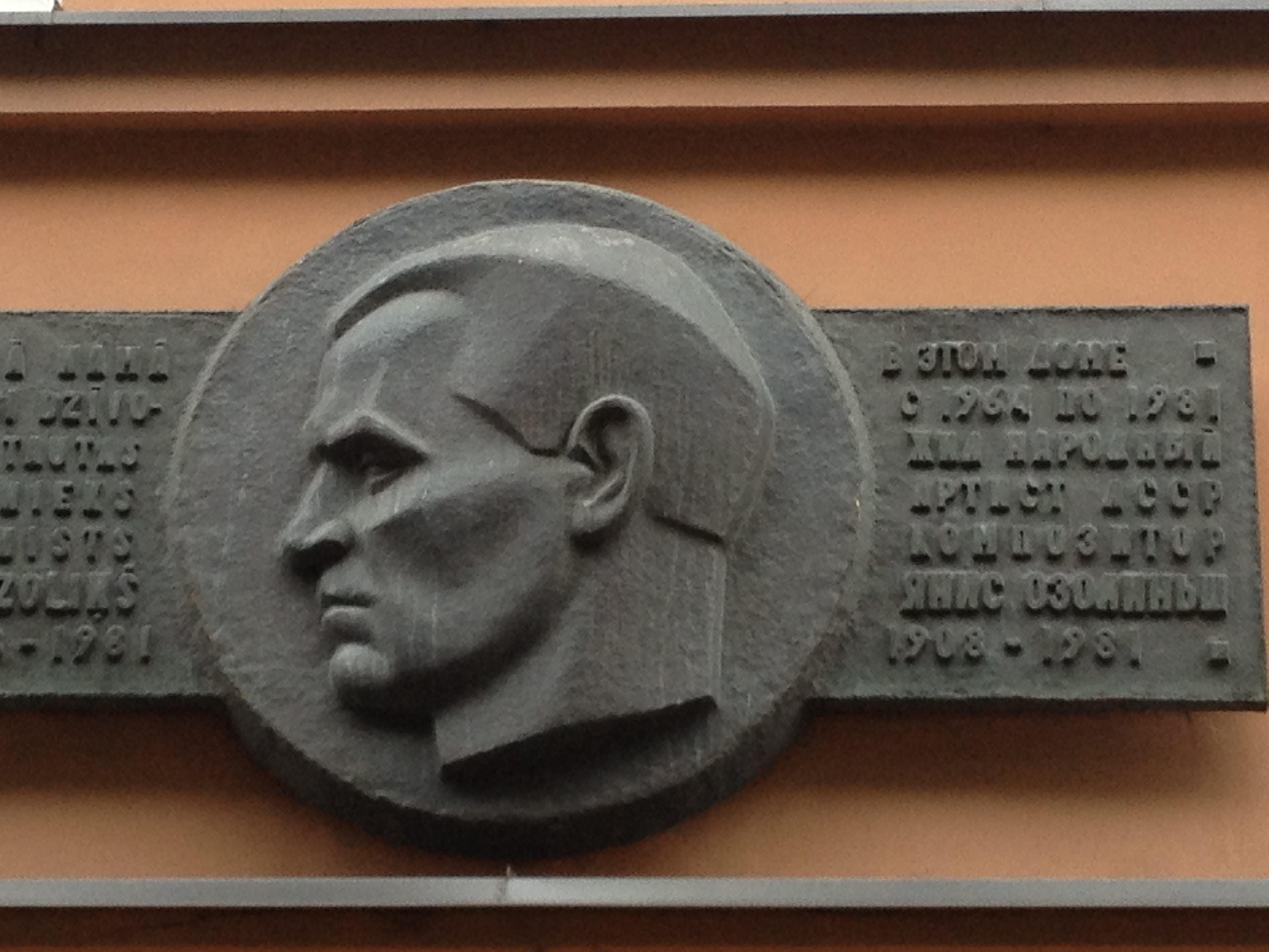 Plaksne komponistam Jānim Ozoliņam